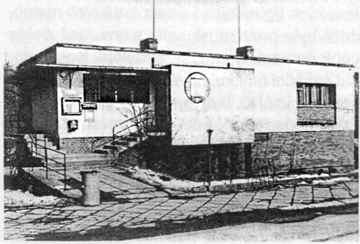 2. pošta Rájec-Jestřebí, dnes přestavěna (původně architekt Josef Kranz)